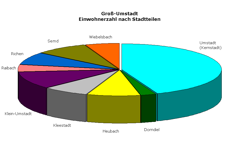 Gliederung der Einwohnerzahl Groß-Umstadt nach Stadtteilen